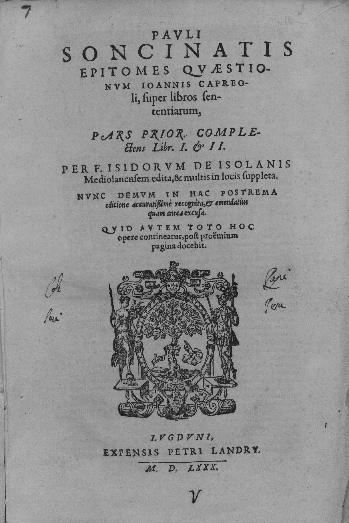 Frontespizio